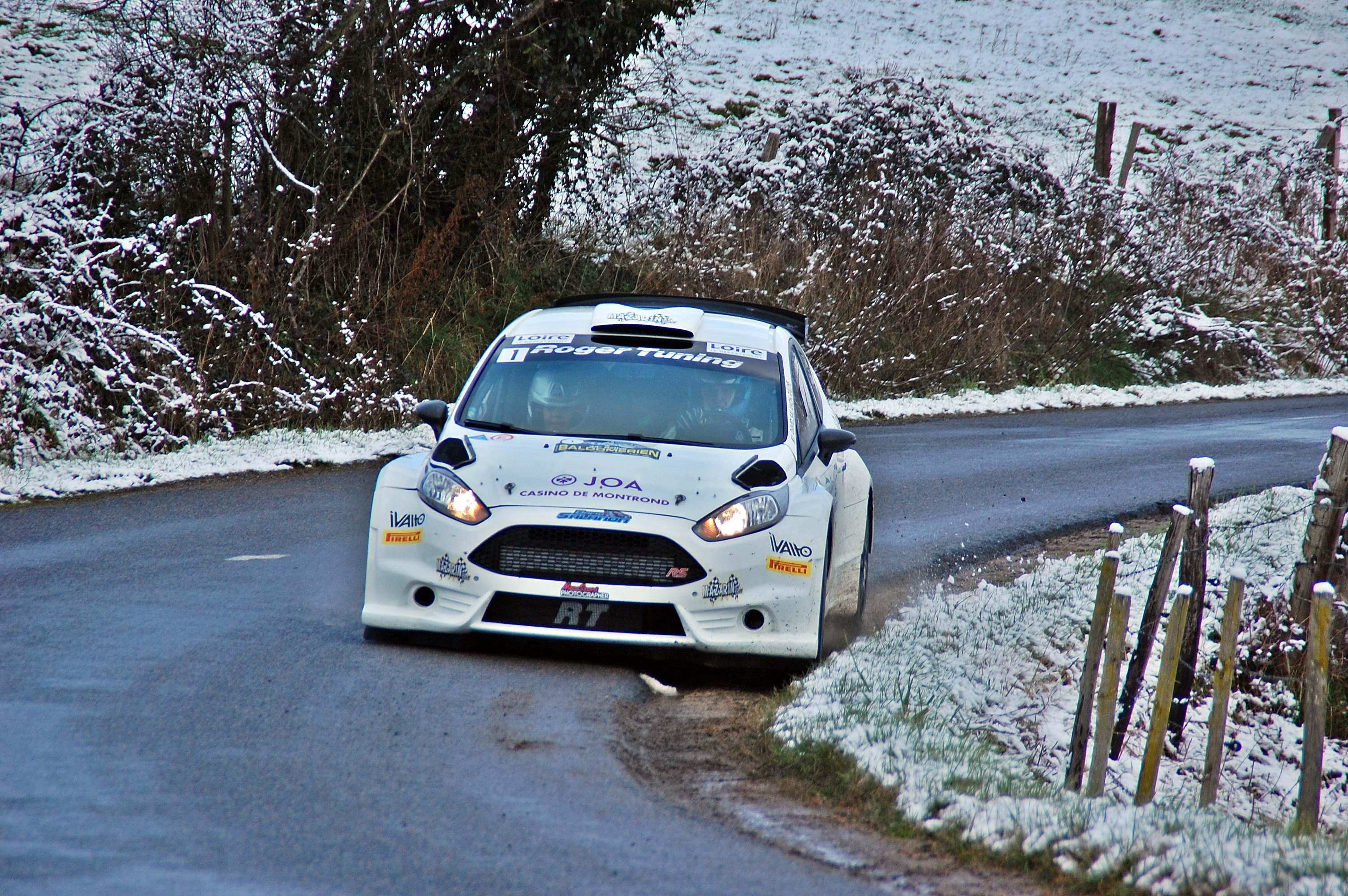 Cette édition marquée par le froid et la neige n'aura pas refroidi notre pilote , victorieux sur ses terres